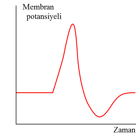 Bir normal aksiyon potansiyeli grafiği